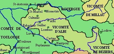 La vicomté d'Albi en 1209